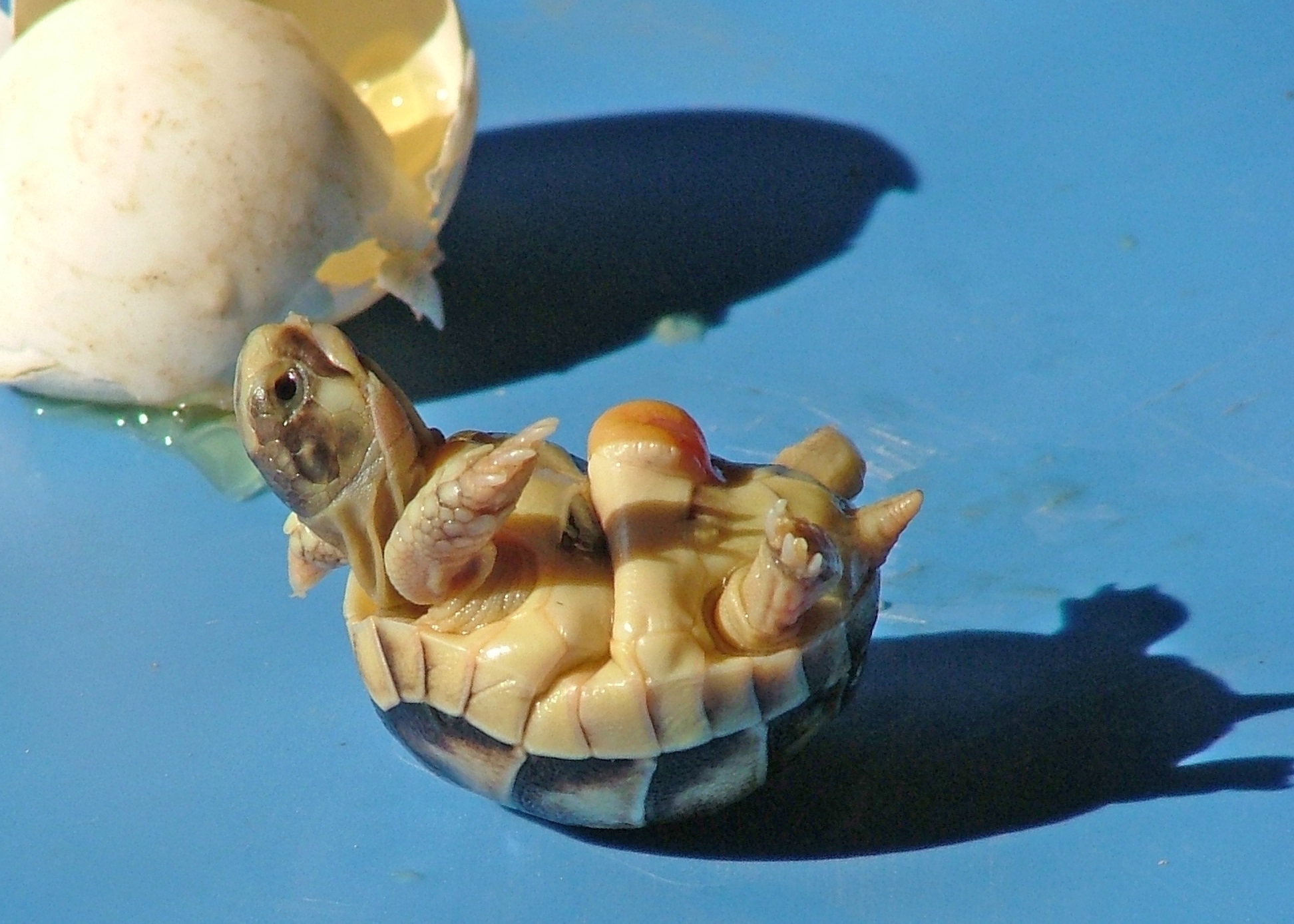 Breetranddeckelsmouk (Testudo marginata) frësch aus dem Ee